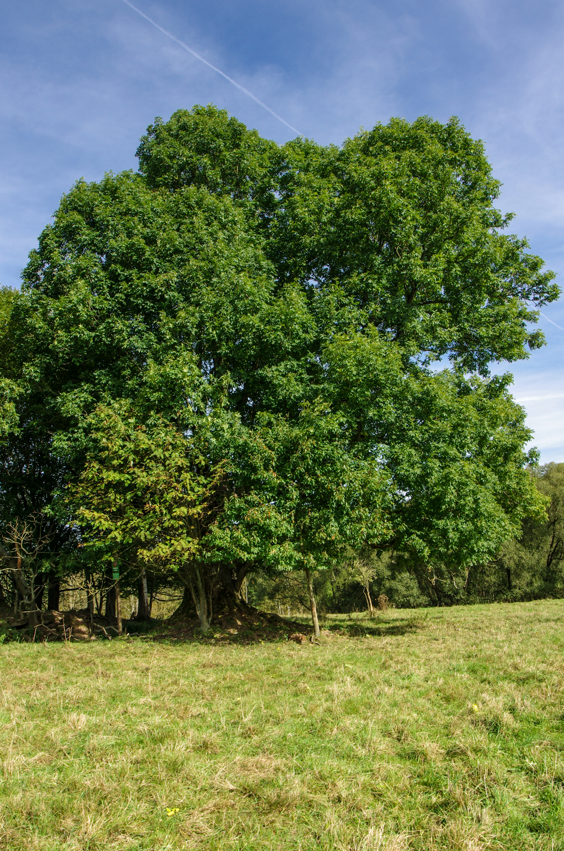 památný strom Jasan v bývalé Dolní Vsi, okres Sokolov